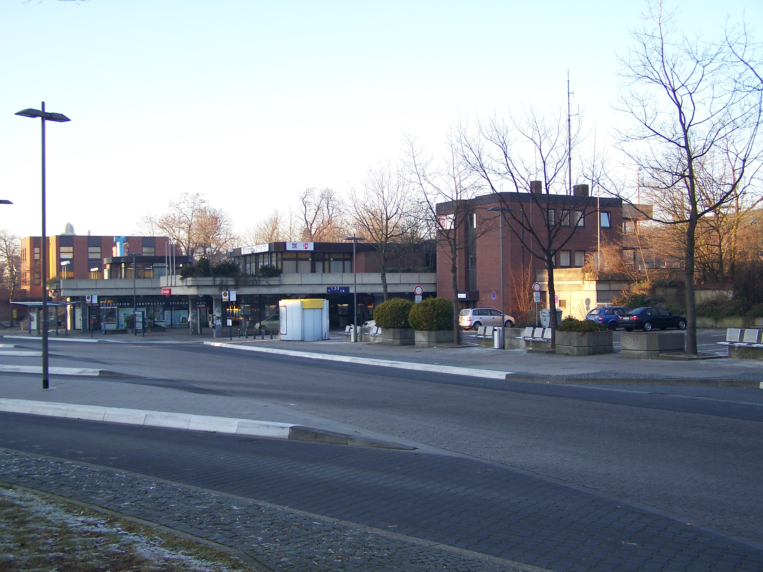 Bahnhof Ibbenbüren mit Busbahnhof und Post im hintergrund